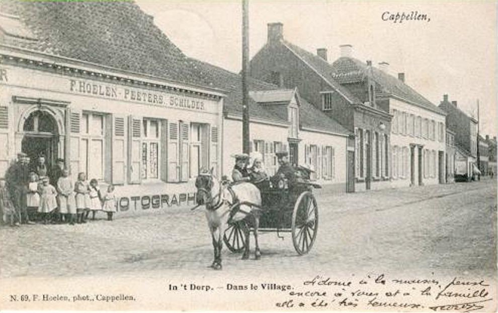 F Hoelen-Peeters Schilder - Dorpszicht Kapellen